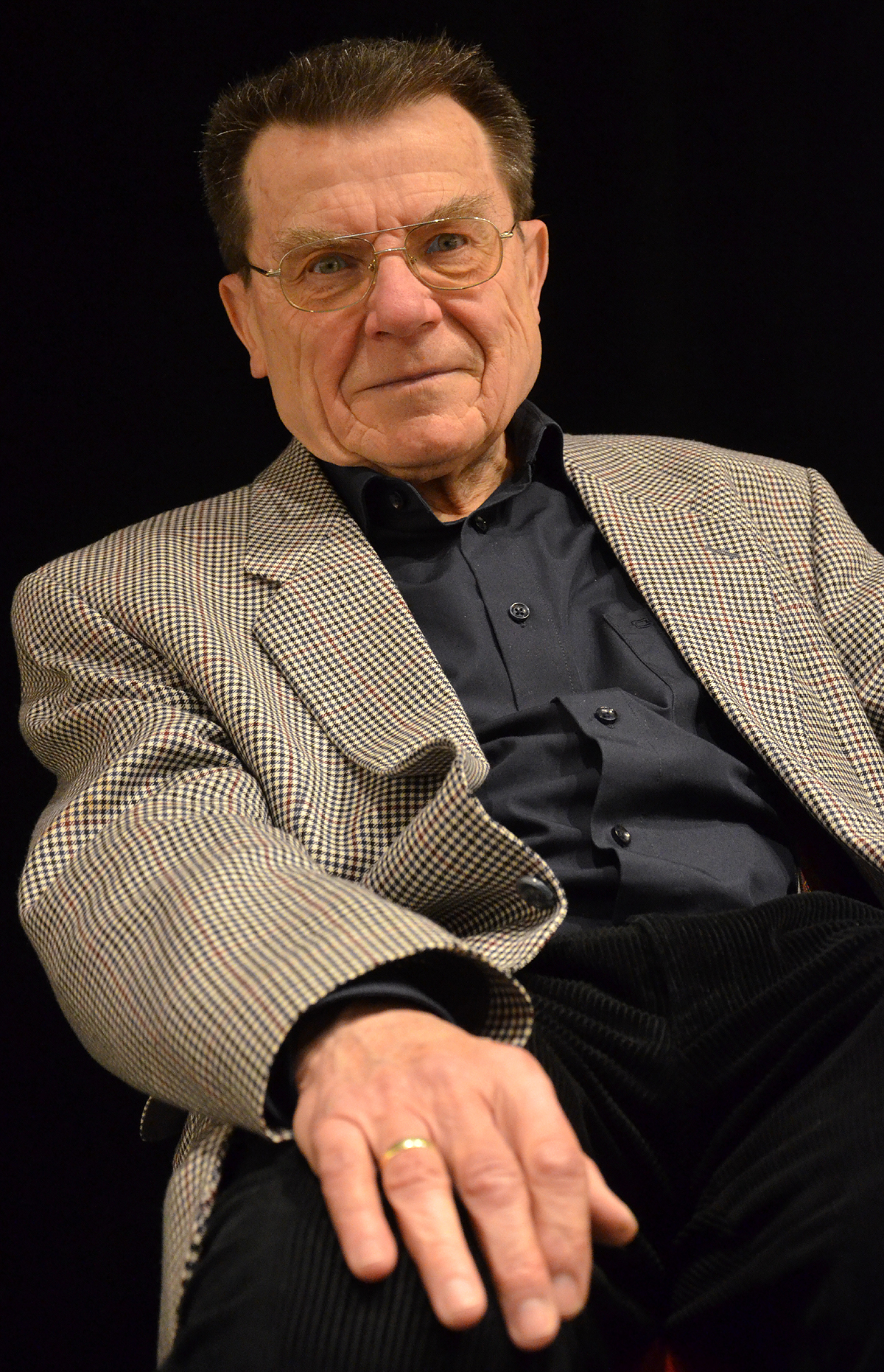 Lajos Rovatkay, ehemals Professor an der Hochschule für Musik, Theater und Medien Hannover, hier auf der Bühne im Theatermuseum Hannover nach seinem vom Richard Wagner-Verband Hannover veranstalteten Vortragsabend über den Opernkomponisten Agostino Steffani unter dem Titel Agostiono und die Anfänge der Oper in Hannover ...